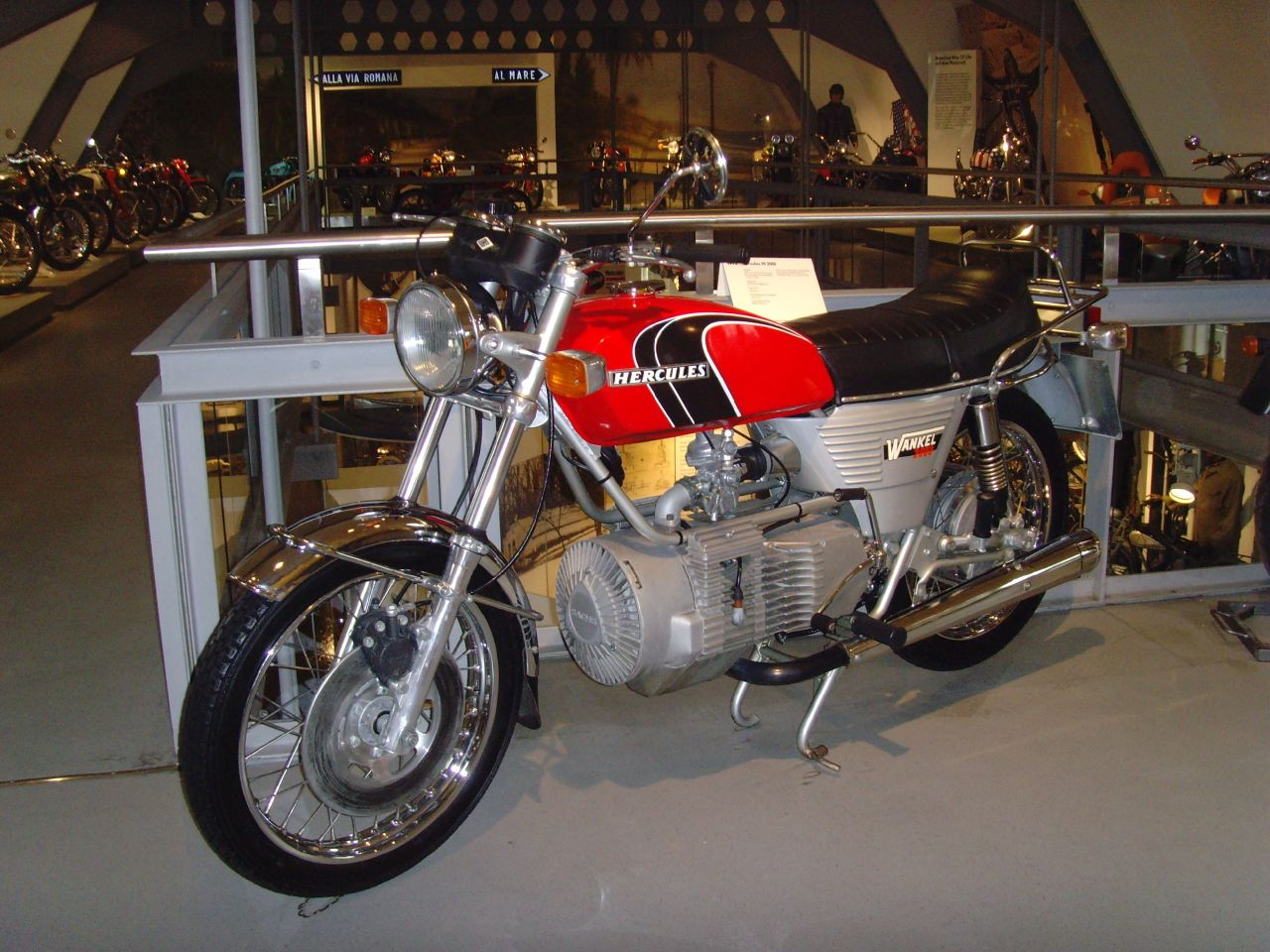 Hercule W 2000